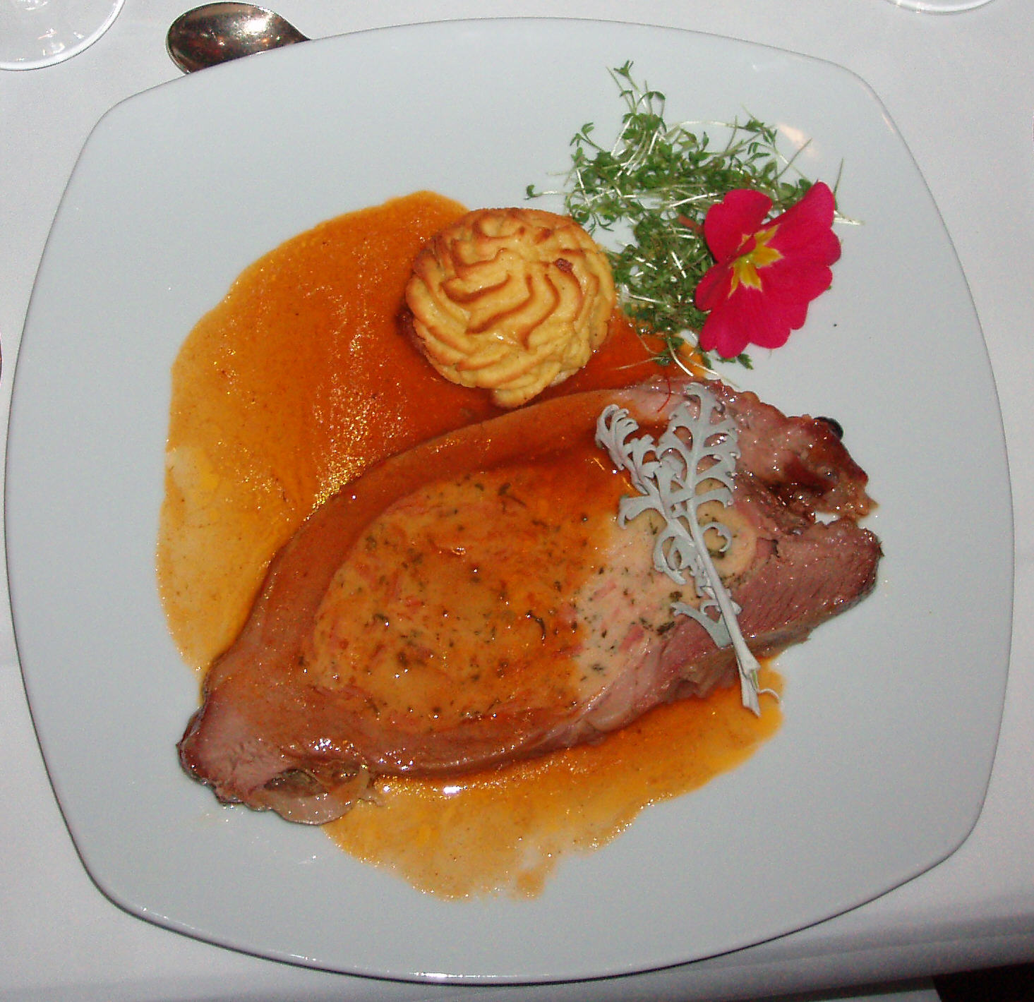 Gefüllte Kalbsbrust und Herzoginkartoffeln